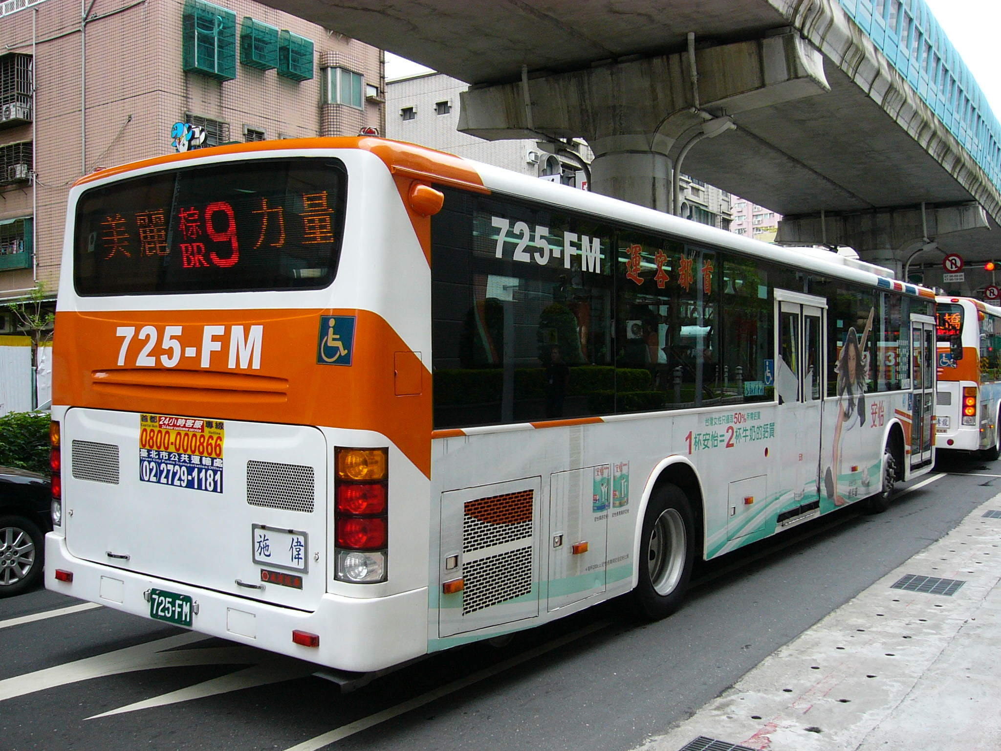 首都客運Daewoo BS120CN大客車725-FM後端外觀。